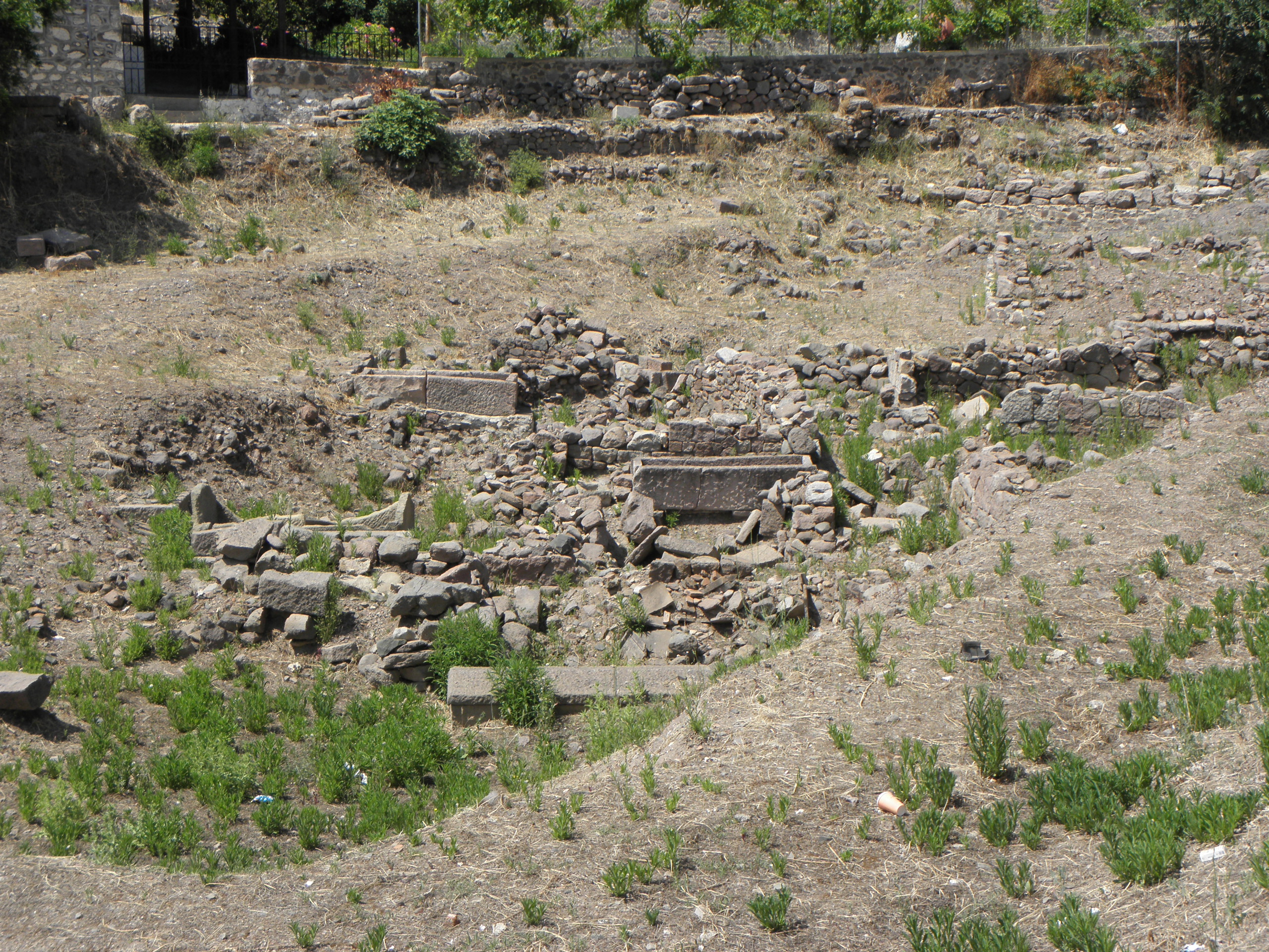 Pozůstatky antické nekropole v Mithymně, Lesbos